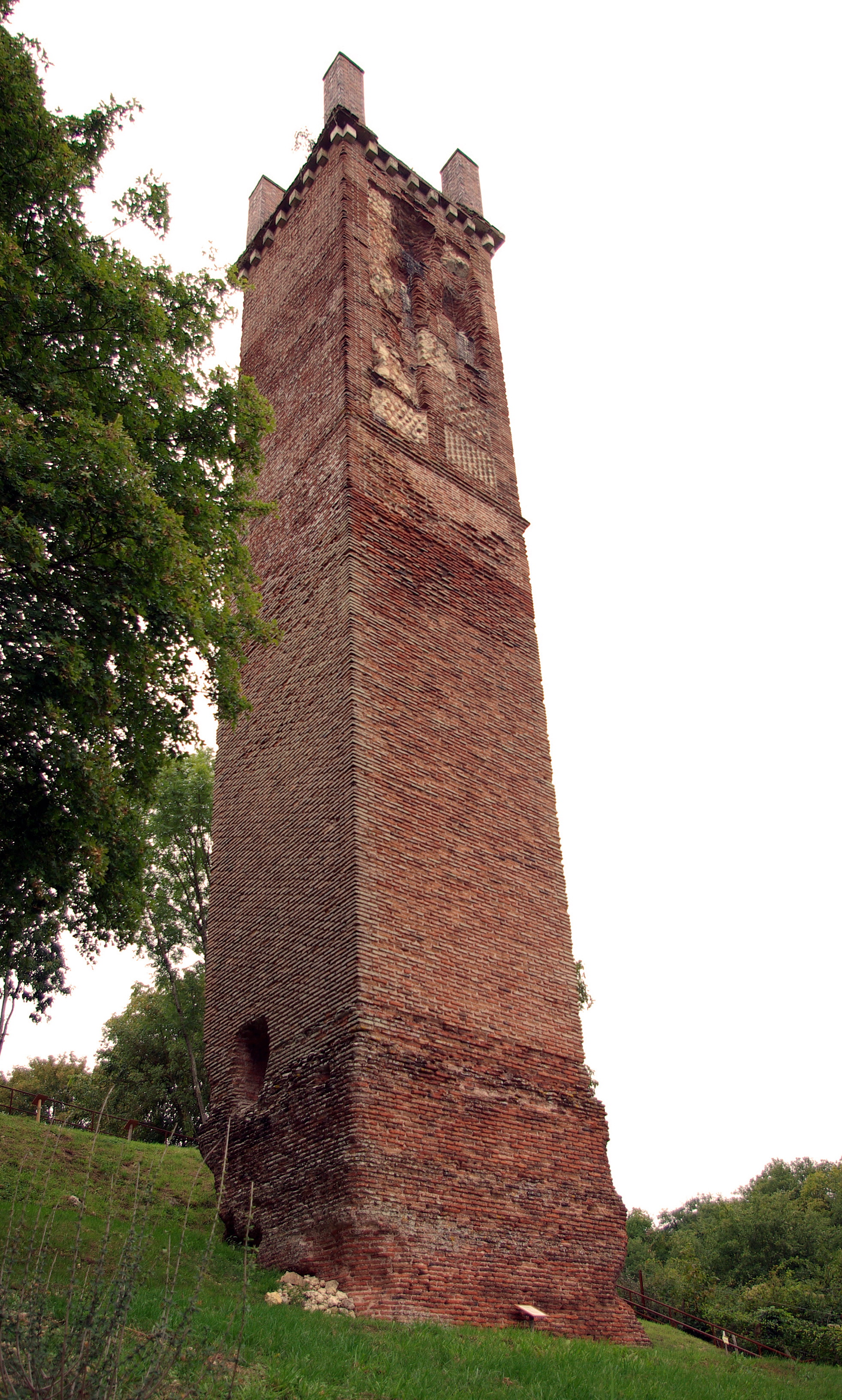 Pile romaine de Cinq-Mars-la-Pile.